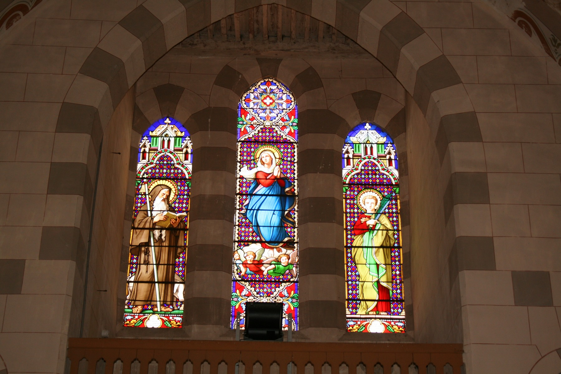 Vitraux de l'église St Pancrace à Roisey